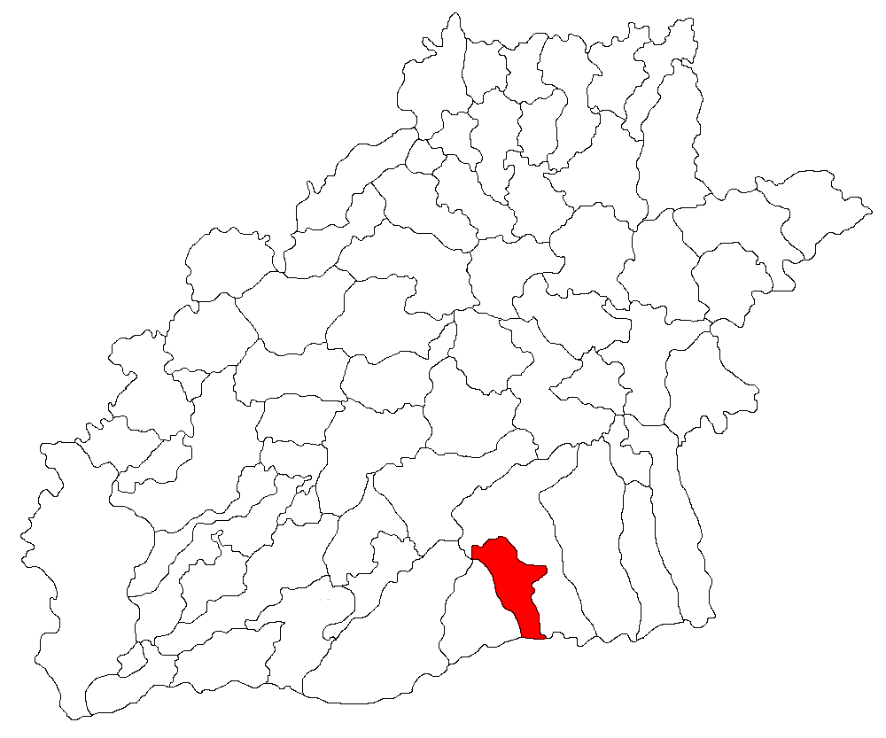 Categorie:Hărţi ale judeţului Sibiu